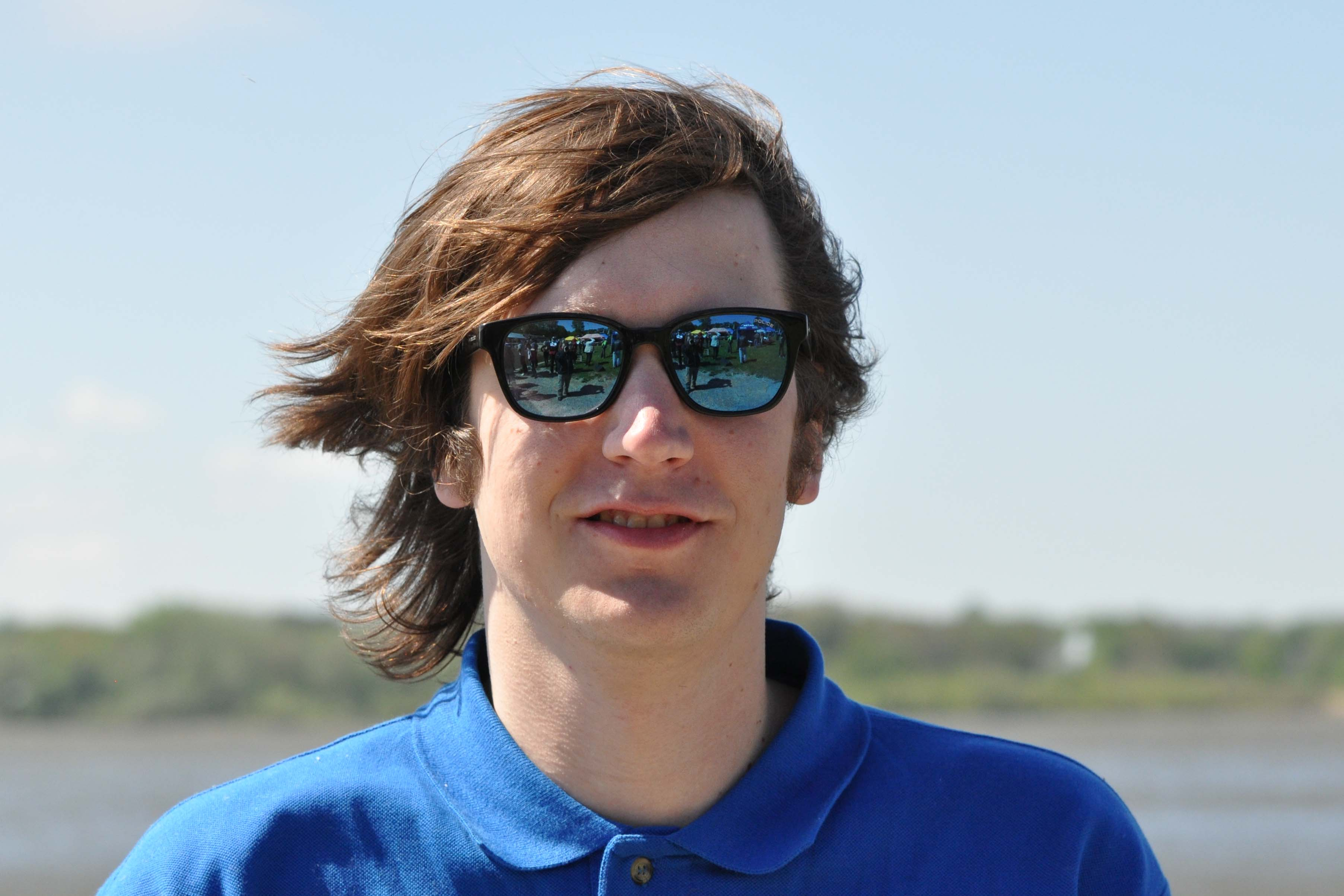 Erko Aabrams veemoto maailmameister